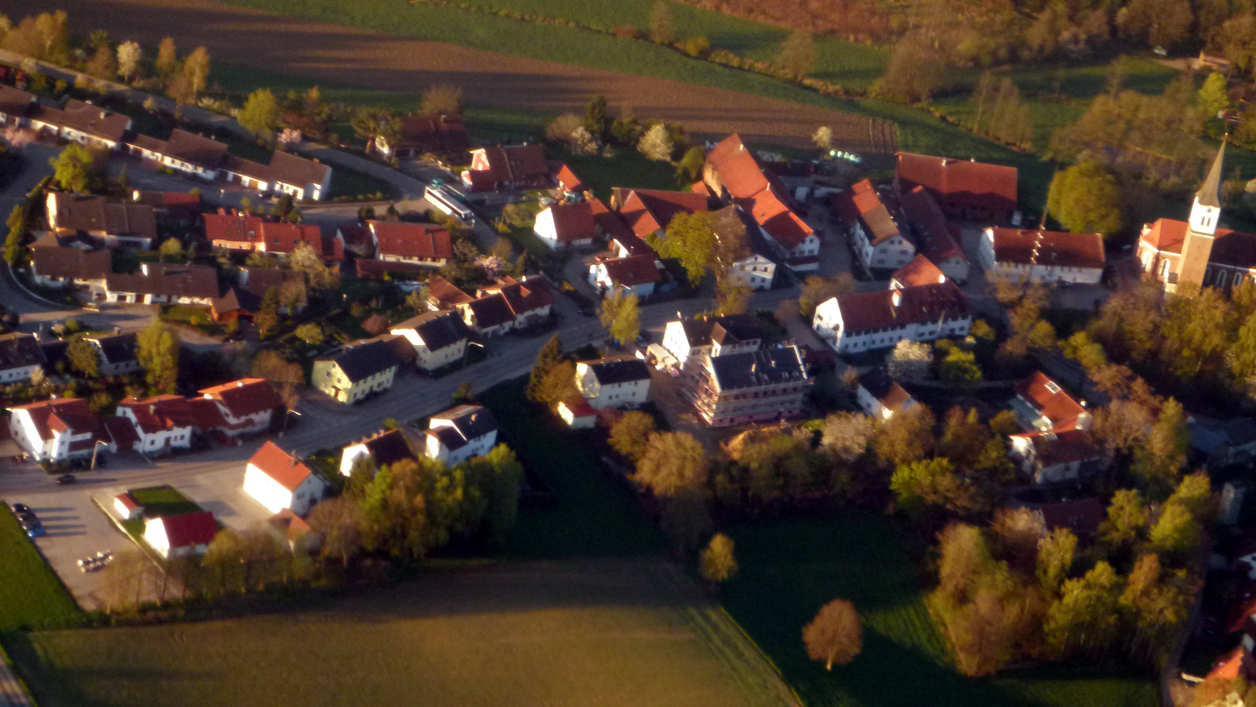 Luftbildaufnahme von der Gemeinde Steinkirchen (Oberbayern)